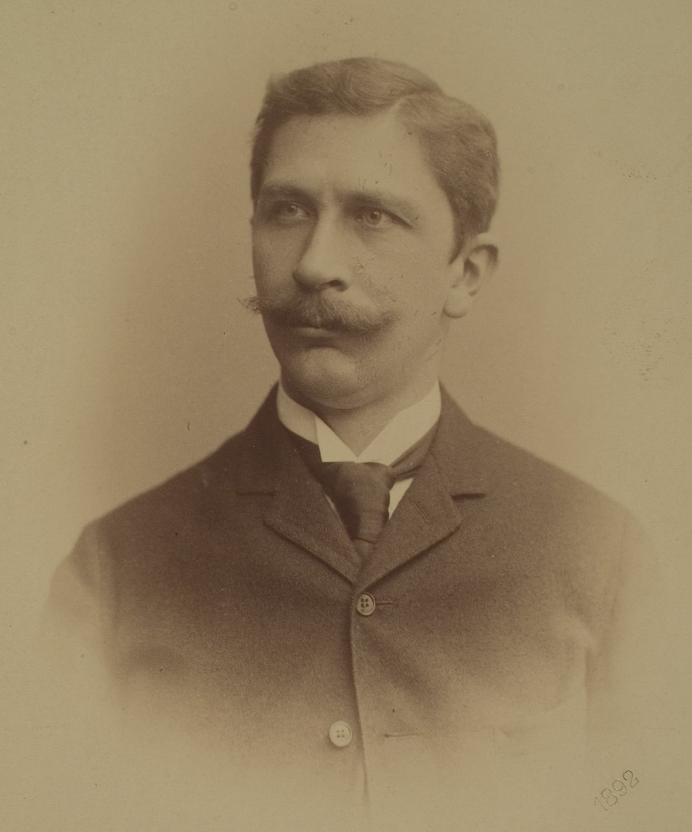 Rudolph Ernst Brünnow, Orientalist, 1890–1904 Professor für orientalische Sprachen in Heidelberg